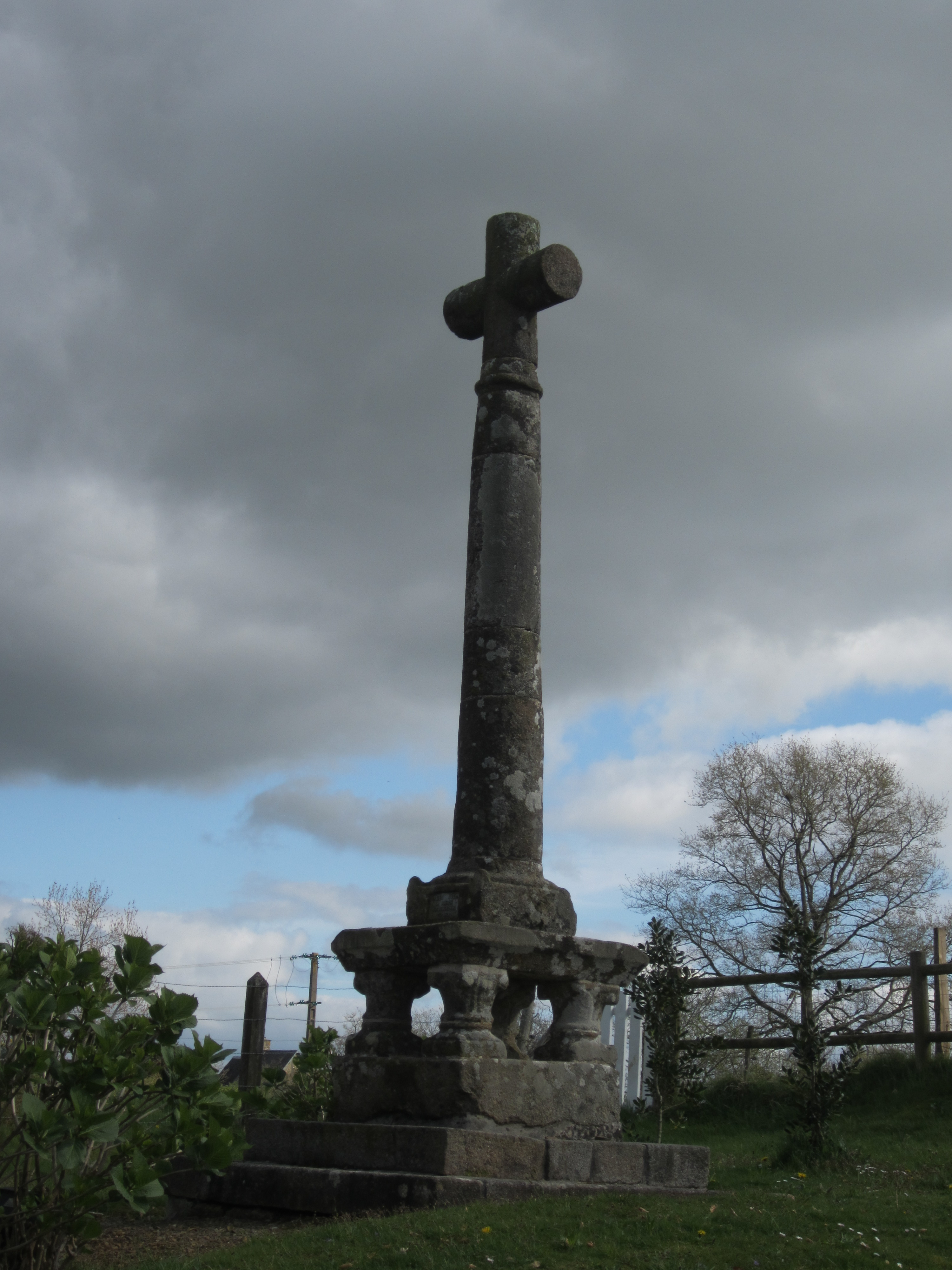 La Mouche, Manche